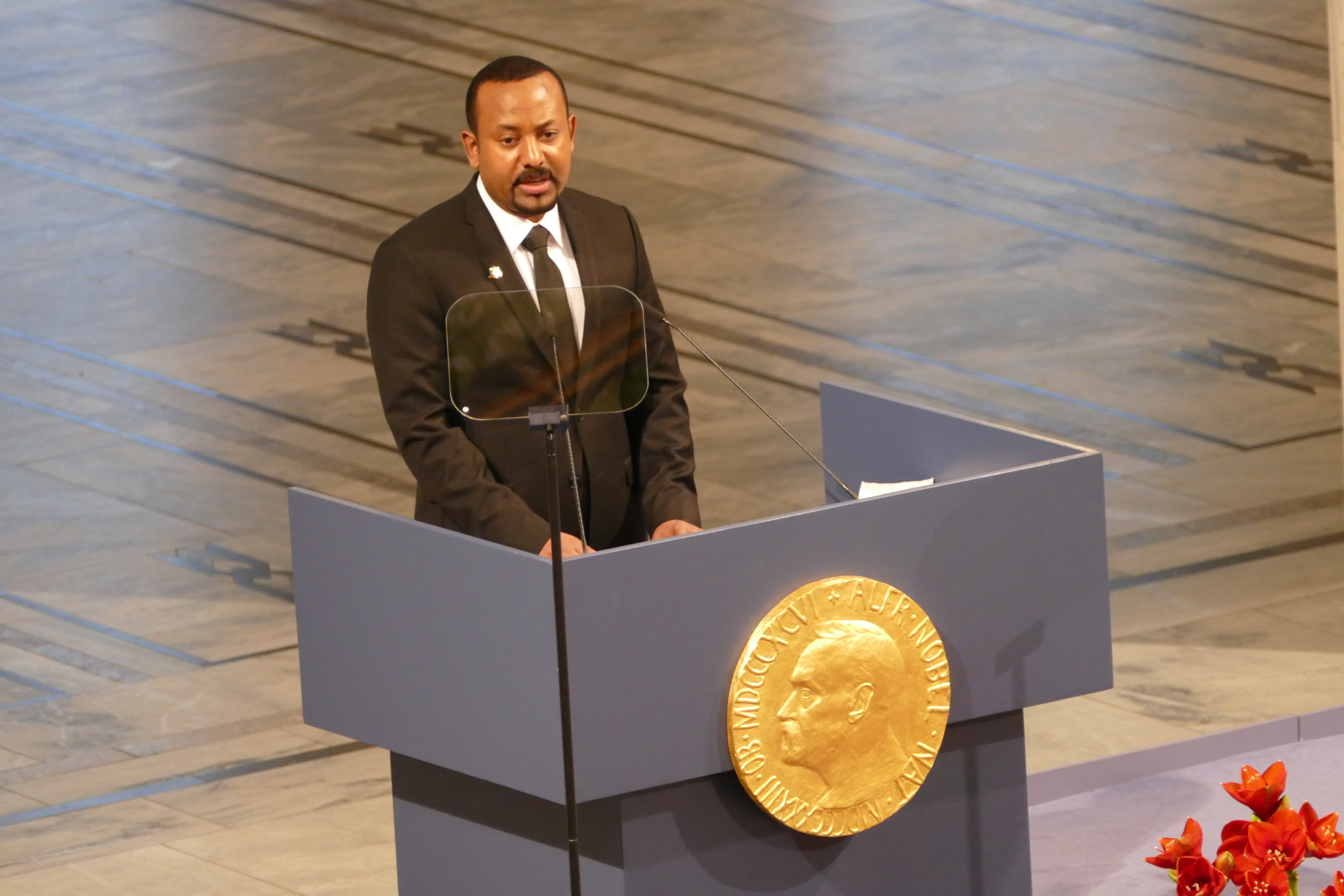 Etiopias statsminister Abiy Ahmeds fredspristale.